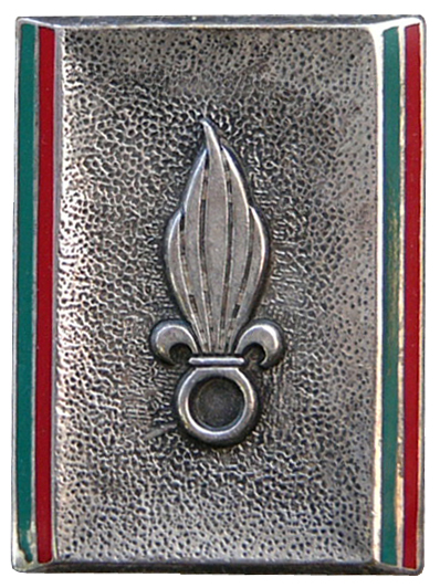 Insigne du commandement de la légion étrangère (COMLE), créé en 1947 par le colonel GAULTIER, et porté successivement par les DCRE, DCLE, COLE, ITLE, GLE, RILE, 4e RE puis le dernièrement par le COMLE Homologation : 18/7/1947, sous le N° H541.